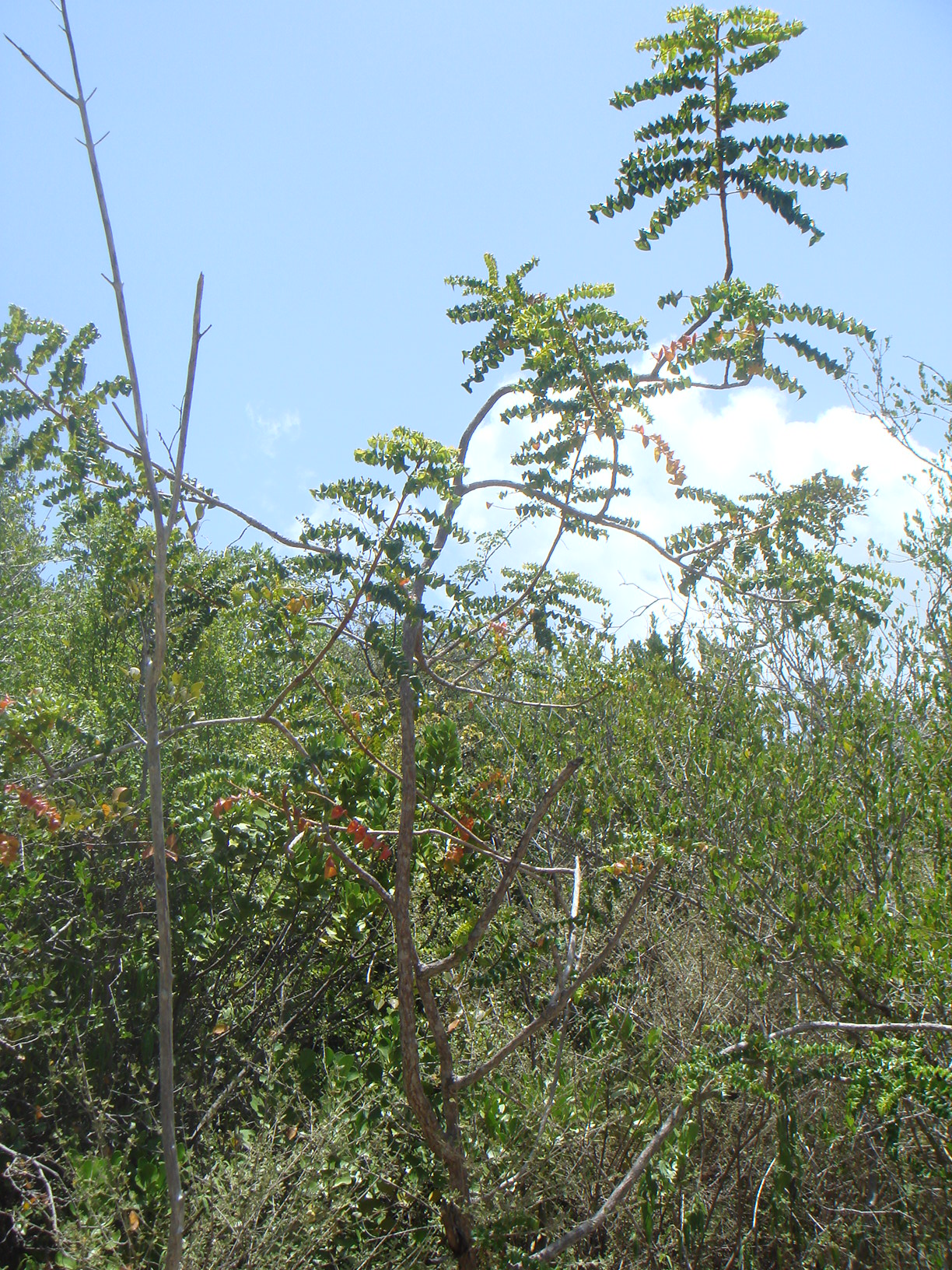 Hábito del chicharrón (Comocladia dodonaea). Bosque tropical seco de Guánica, Puerto Rico.